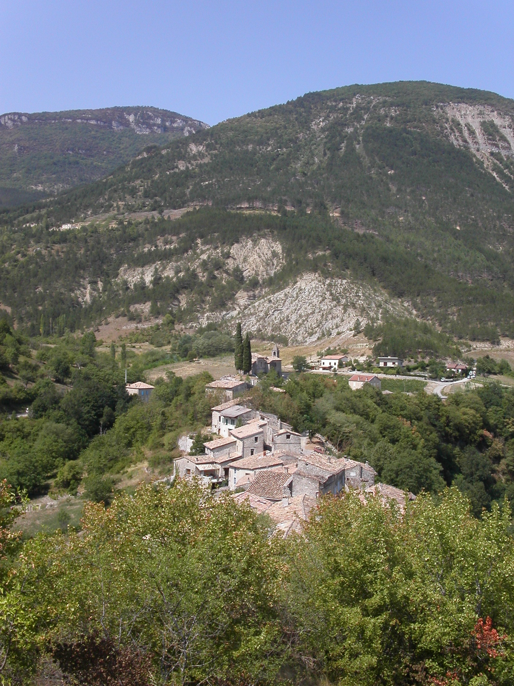 Saint Benoit en Diois depuis les ruines de son chateau.